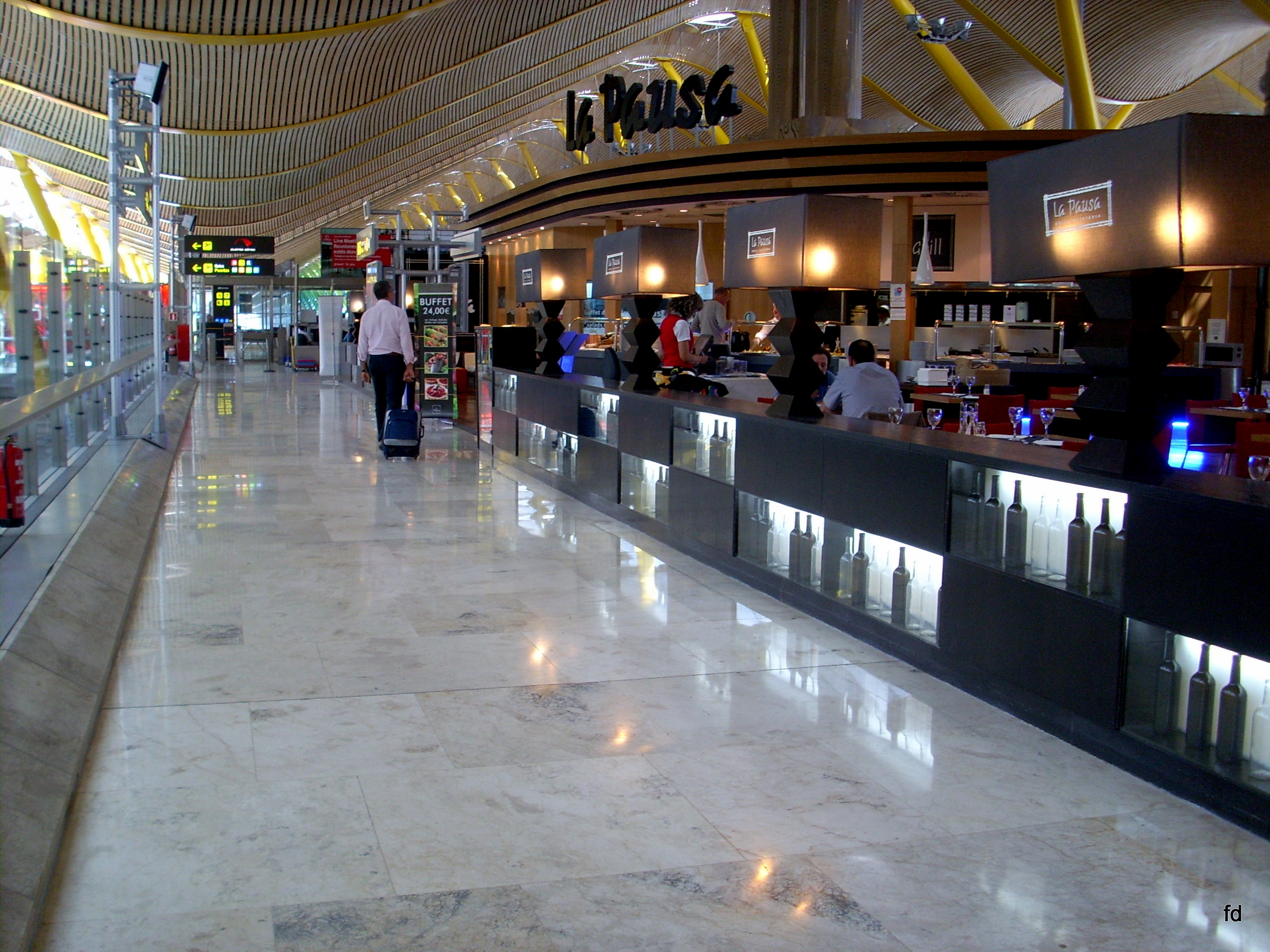 Abflugterminal Madrid Barajas Servicebereich